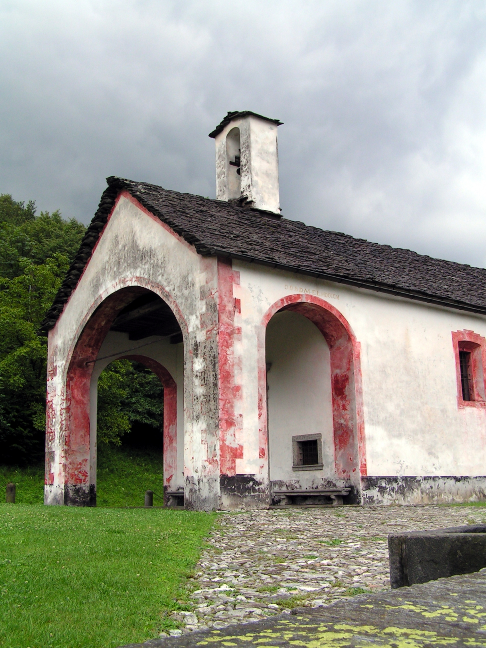 Via Cantonale Vecchia, Maggia. Église de Santa Maria delle Grazie in Campagna.